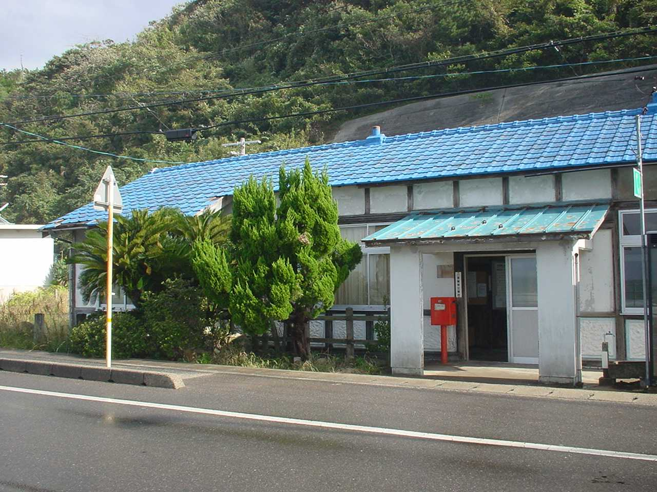 宇田郷駅（2005年10月22日投稿者が撮影）